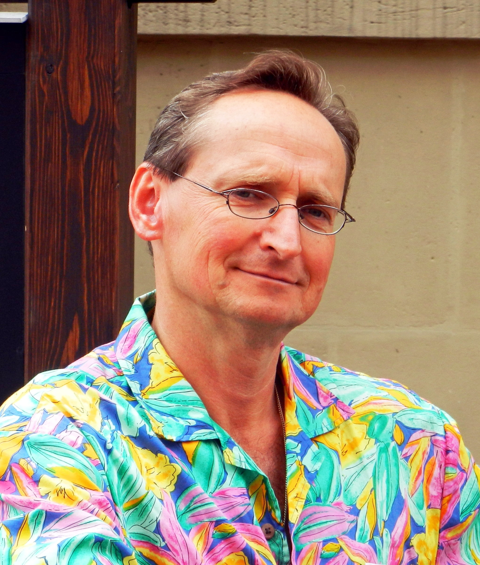 Wojciech Cejrowski, Gdańsk 2011.